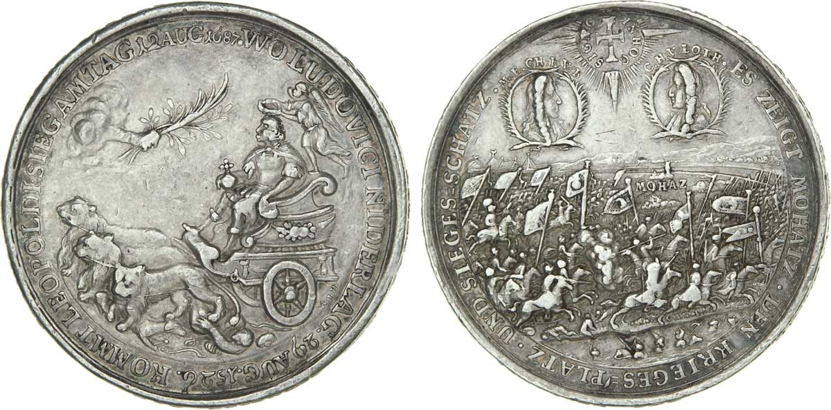 Médaille commémorant la Bataille de Harsa dite “de Mohacz” (Hongrie), 1687.